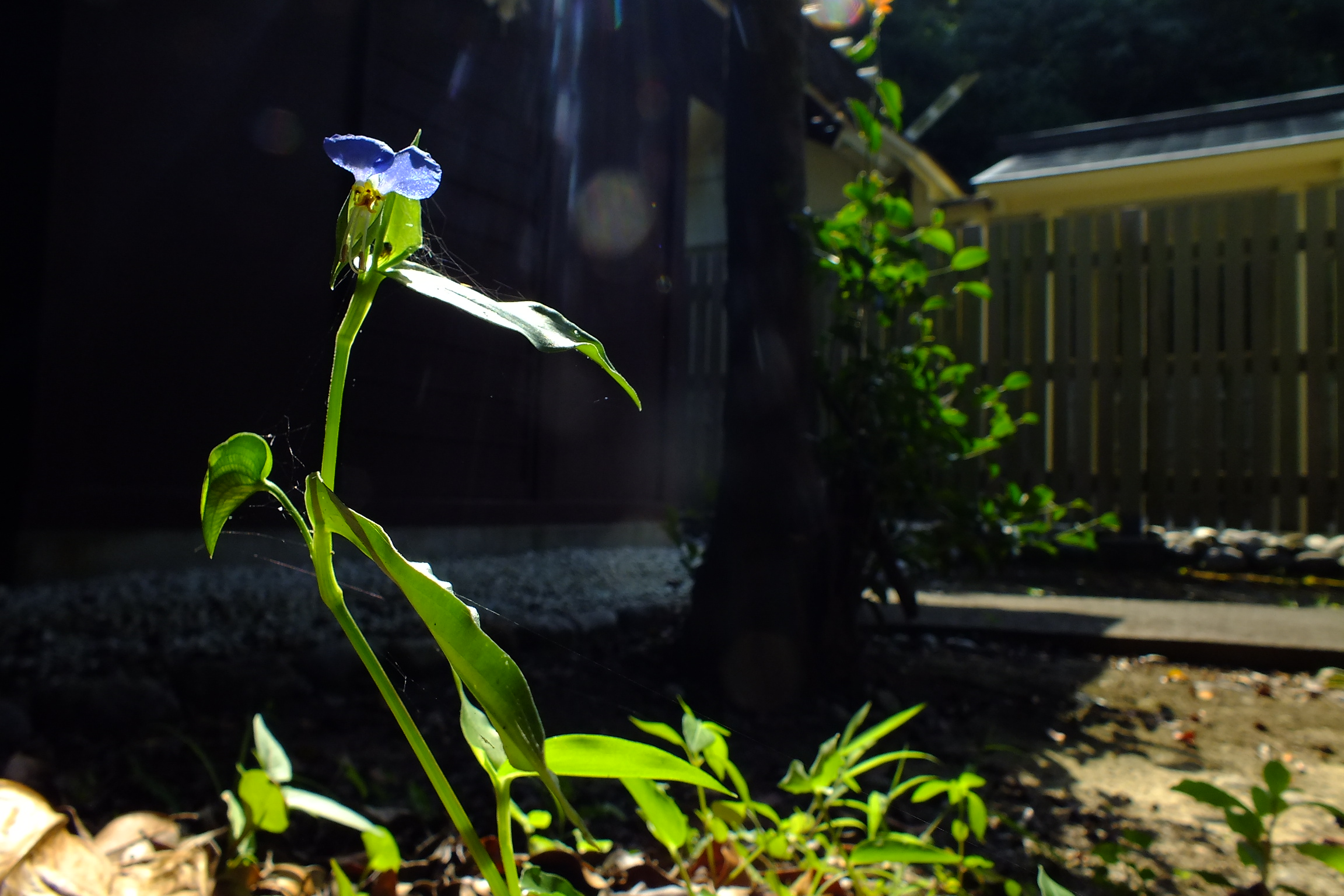 2016-08-05 Yashiro-Shrine in Kami Island (Mie)八代神社 三島由紀夫が『潮騒』に描いた八代神社